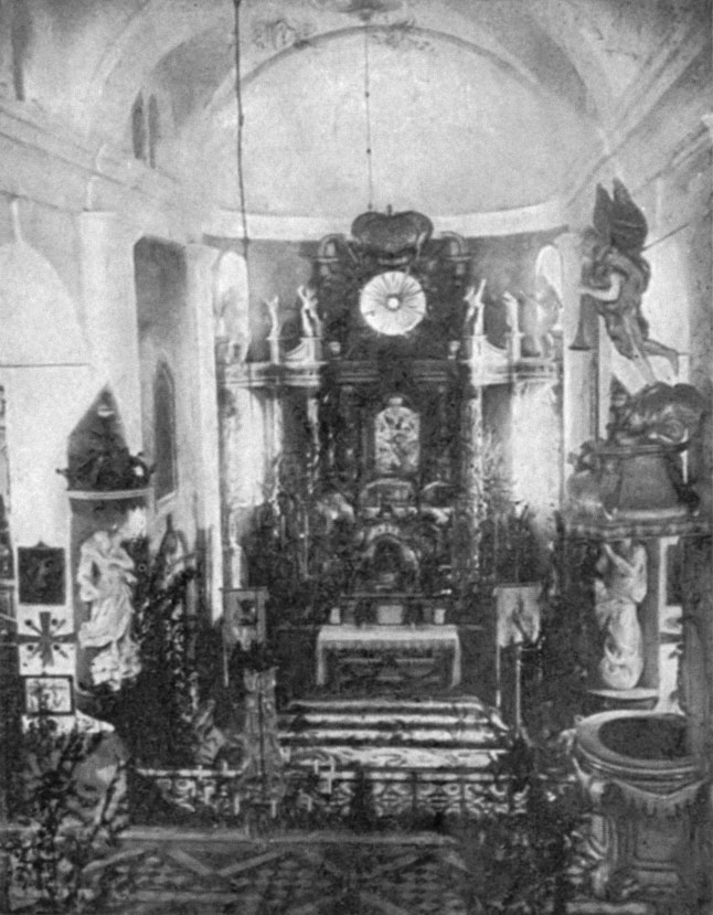 Беларуская (тарашкевіца): Чарэя (Čareja), пляц Рынак (plac Rynak). Касьцёл Сьвятога Міхала Арханёла.